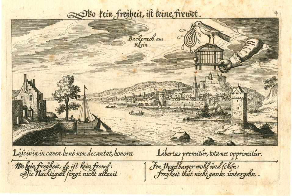 aus Daniel Meisner's Schatzkästlein Die Darstellung zeigt nicht Bingen. Es ist sicher eher Bacharach. Weder Burg(Form) noch Basilika (Standort) sowie die Stadtmauertürme (Position) passen. Nachfolgendes Bedarf also der Überprüfung / Klärung. Bingen (irrtümlich als “Bacharach am Rhein”), Kupferstich aus Daniel Meisner’s Schatzkästlein. Ausgabe bei Eberhard Kieser, Frankfurt a. M., 1625.